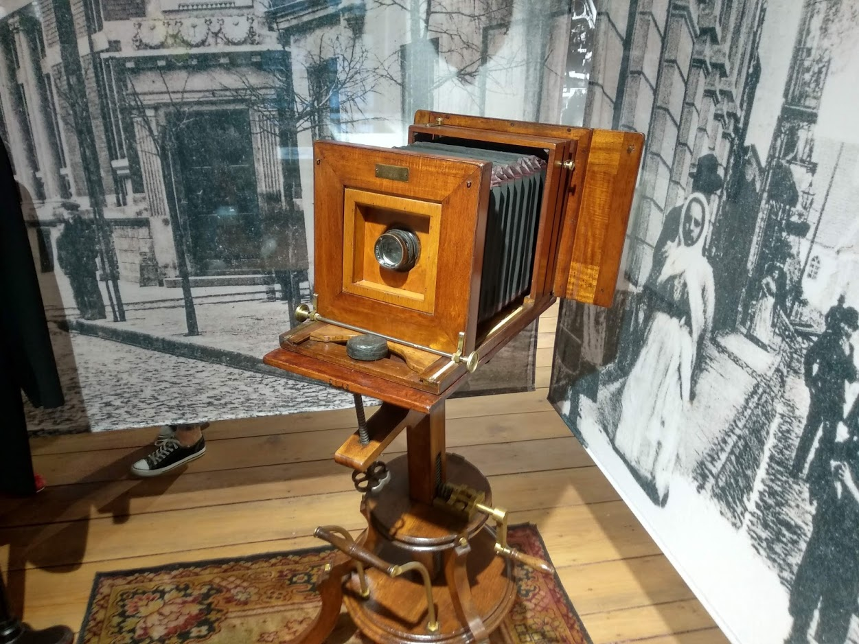 Muzeum Historii Włocławka (2019 r.)